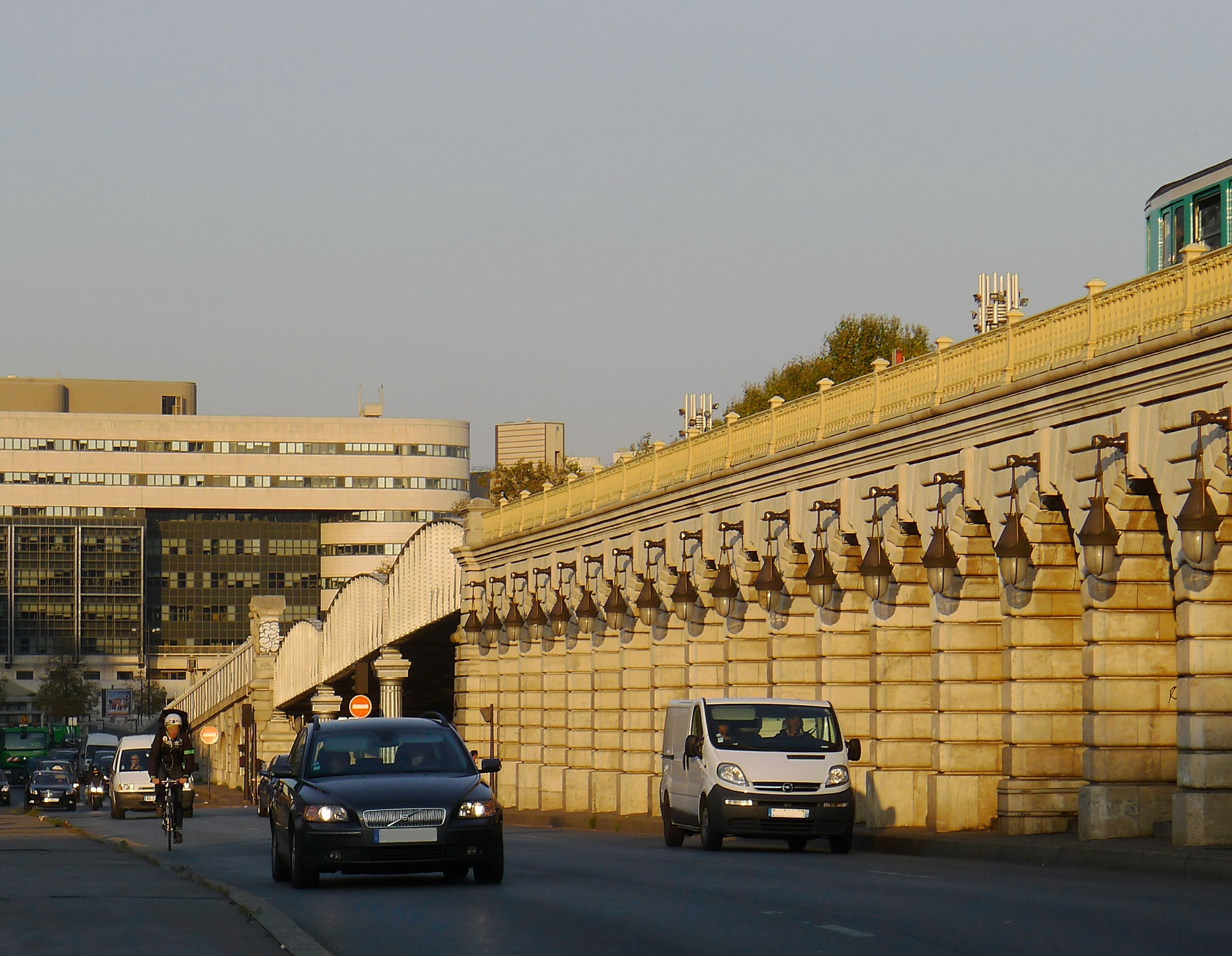 Pont de Bercy, viaduc de la ligne de métro n°6 - Paris XII